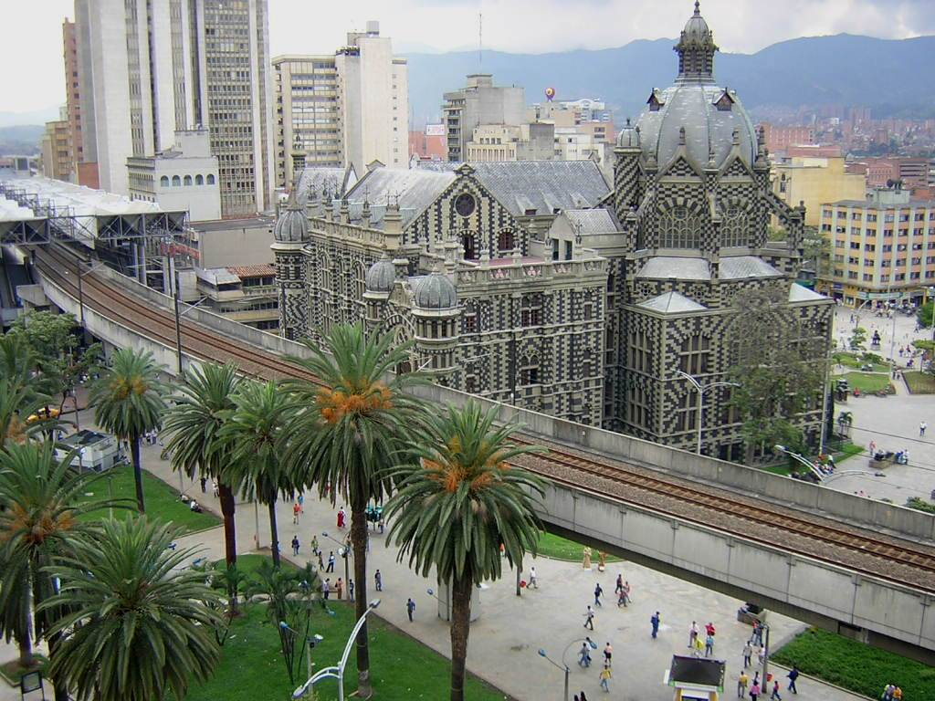 Palacio de la Cultura Rafael Uribe Uribe. Medellín, Colombia